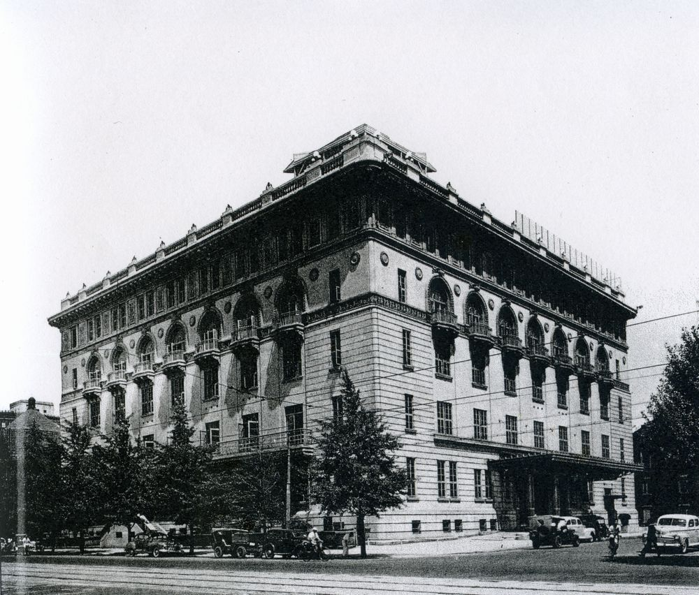 この写真は、東京会館旧本館（尚、1942-1945まで大東亜会館）の写真です。